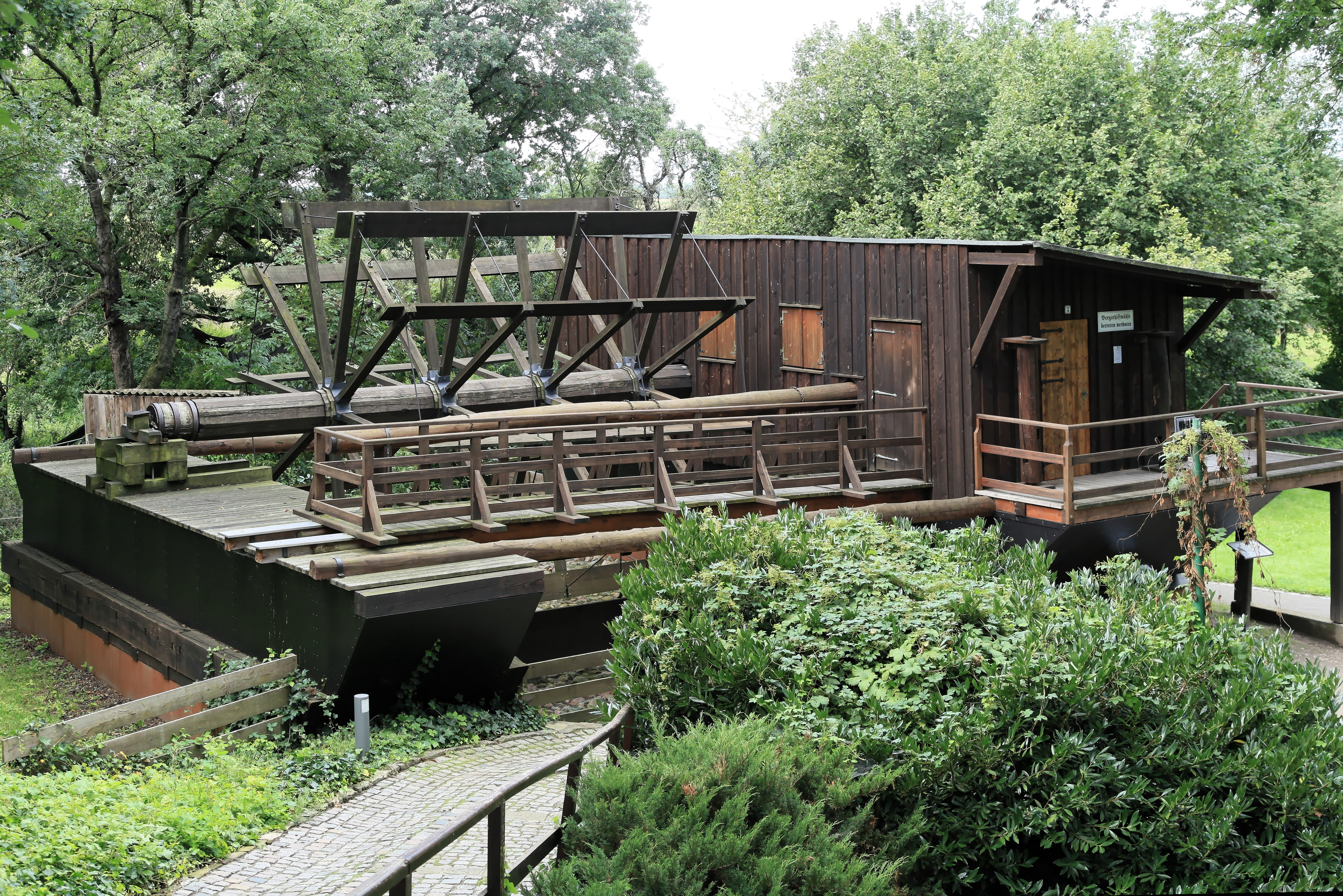 Bergschiffmühle, Schlosspark der Burg Düben, Neuhofstraße in Bad Düben